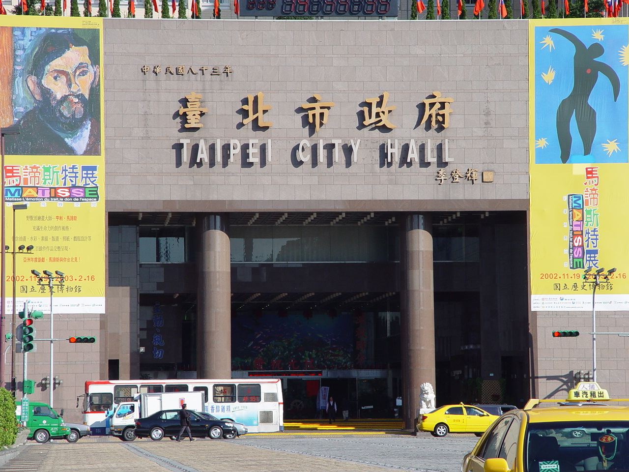 臺北市市政大樓大門，阿仁（seasurfer）站在前方拍攝。